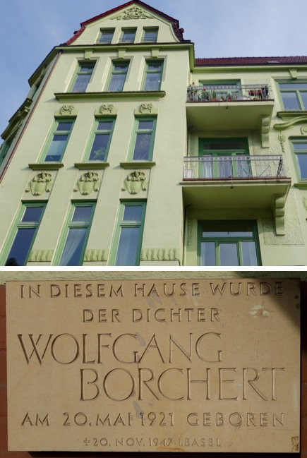 Geburtshaus von Wolfgang Borchert, Tarpenbekstrasse in Hamburg-Eppendorf. Die Gedenktafel wurde vom deutschen Bildhauer Egon Lissow gestaltet. Quelle: Der neue Rump. Lexikon der bildenden Künstler Hamburgs, Altonas und der näheren Umgebung. Hrsg.: Familie Rump. Überarbeitete Neuauflage des Lexikons von Ernst Rump; ergänzt und überarbeitet von Maike Bruhns, Wachholtz, Neumünster 2013, ISBN 978-3-529-02792-5, S. 271.